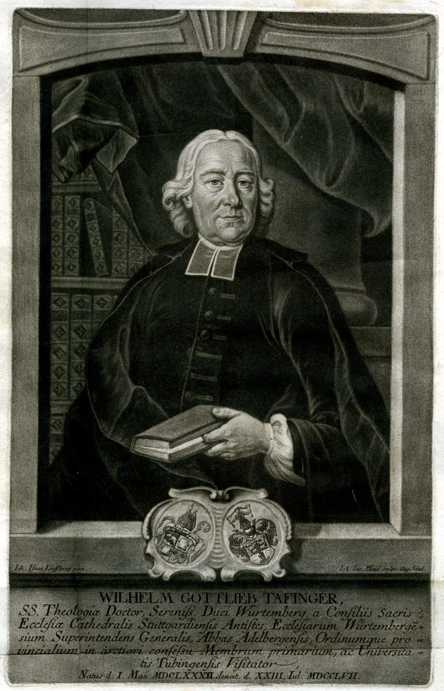 Wilhelm Gottlieb Tafinger (Theologe) Landesarchiv Baden-Wuerttemberg Hauptstaatsarchiv Stuttgart J 67 Bue 95 Bild 1 (1-1257318-1)